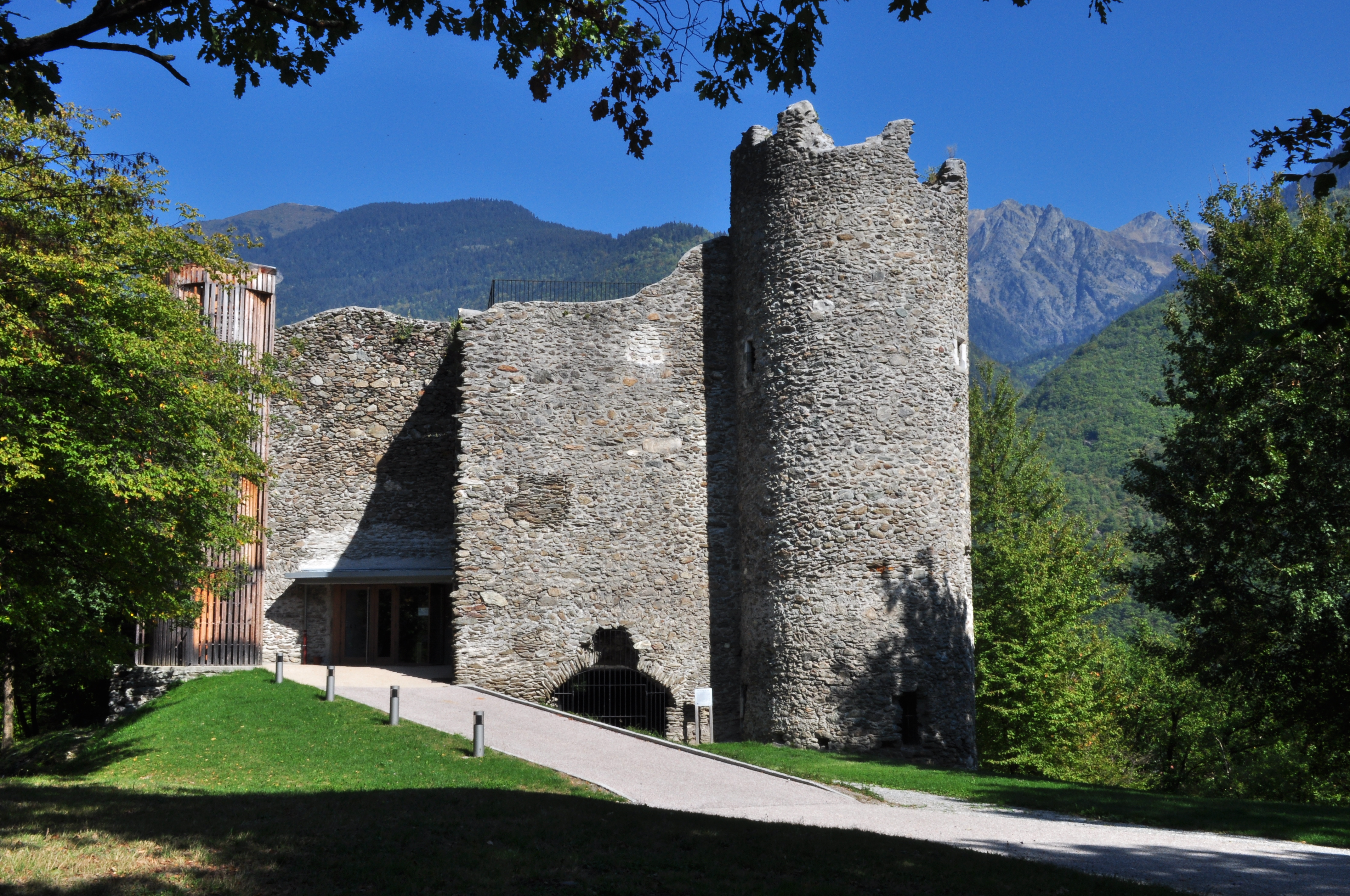 Manoir de Blay